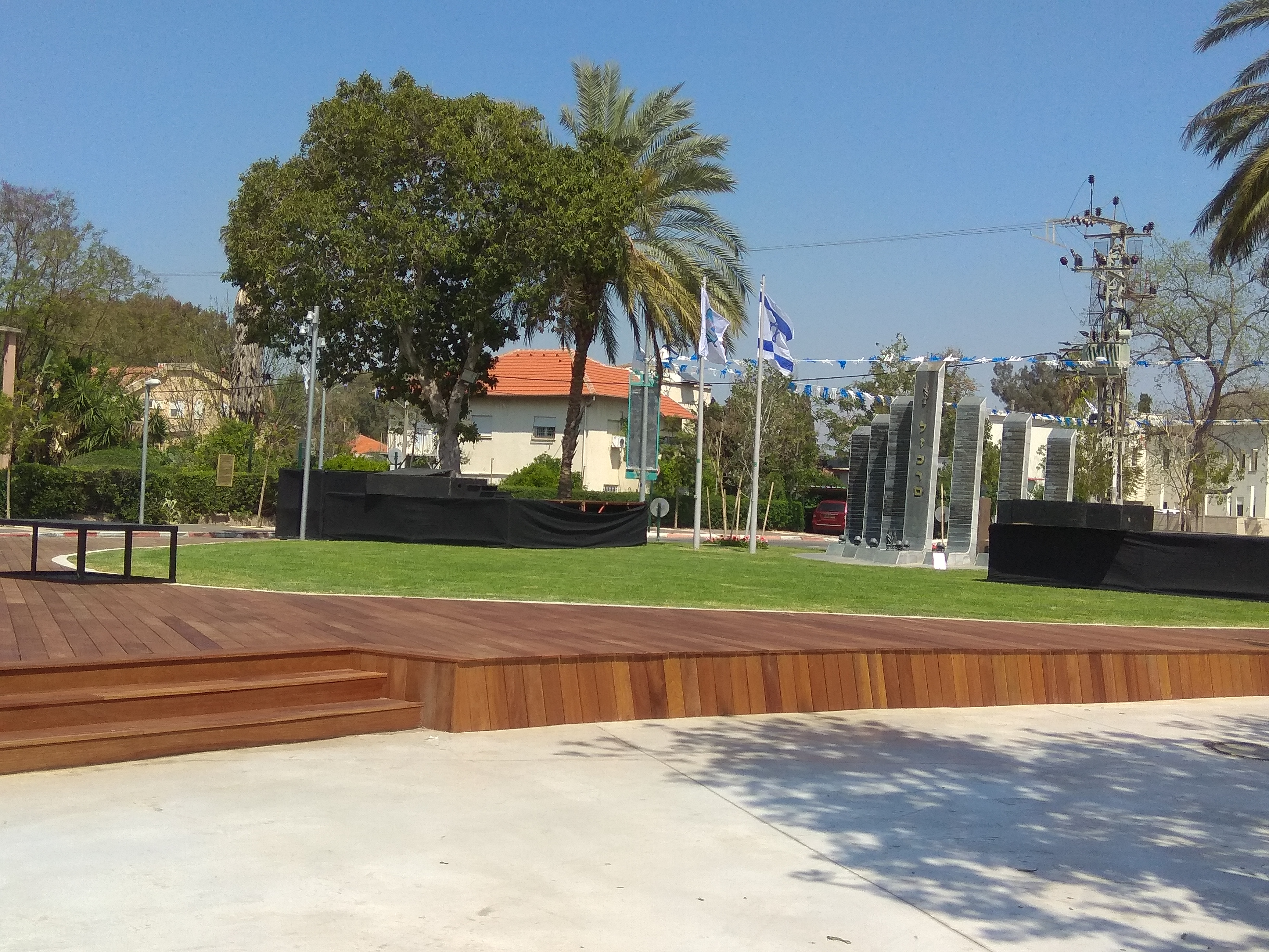 קיר הנצחה לחללי צה"ל